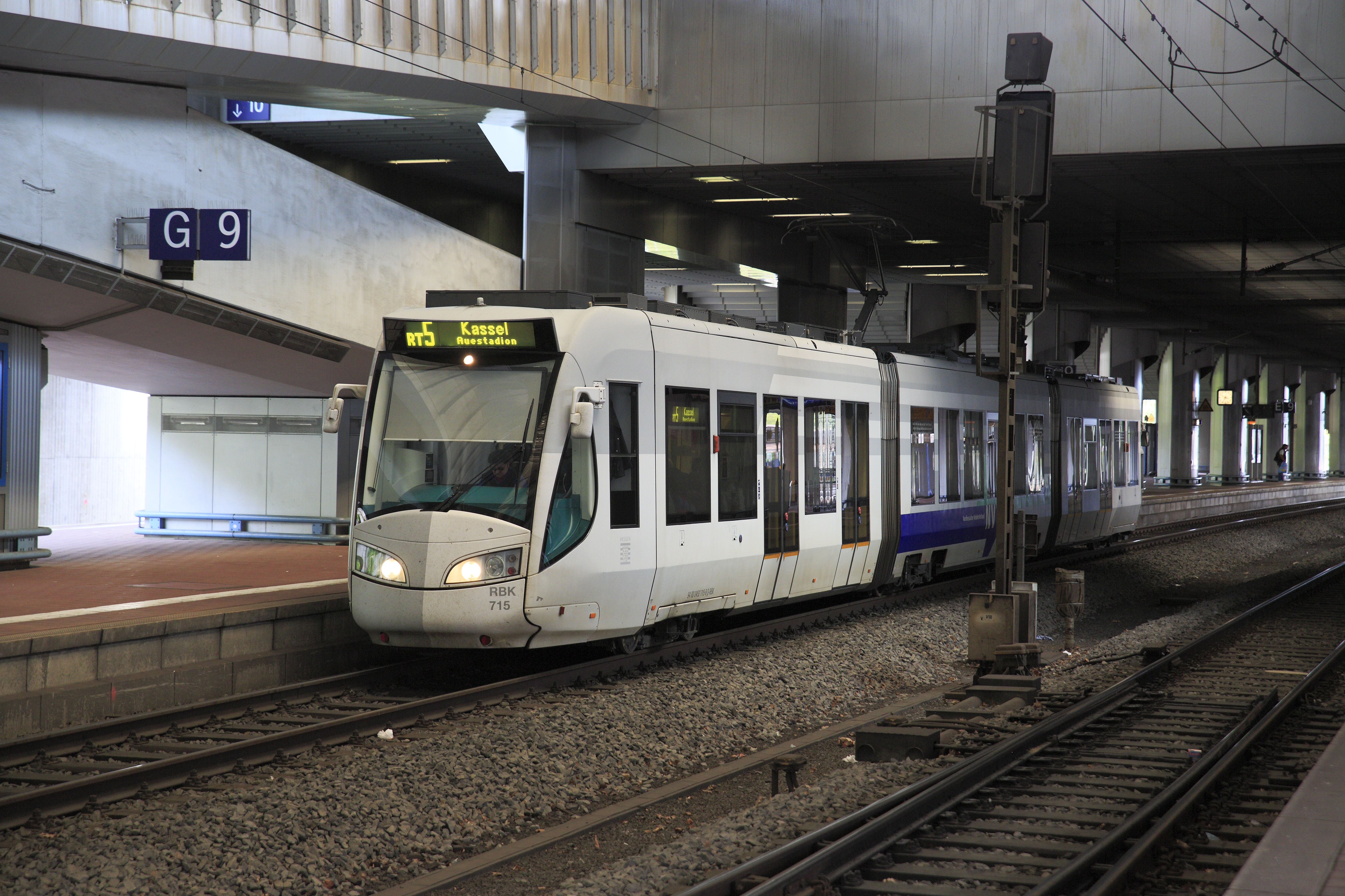 Zweisystemtriebwagen der Regiotram Kassel auf der Linie RT 5 von Melsungen nach Kassel, Auenstadion am üblichen Halteplatz in der Bahnsteighalle.